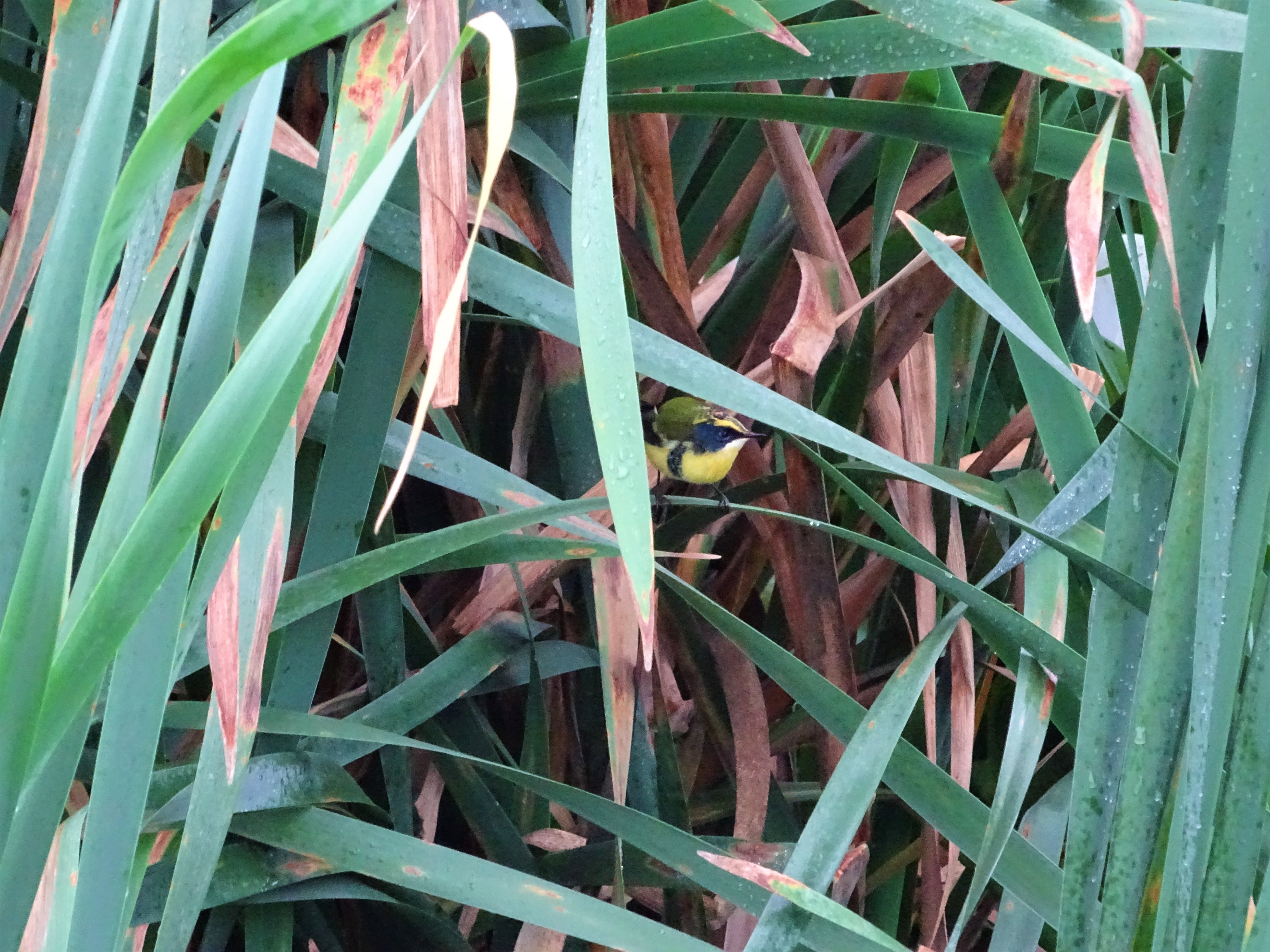 Tachurí Sietecolores -Many-colored Rush Tyrant (Tachuris rubrigastra) — En su habitat tipico, en Parque Finky, Buenos Aires, Argentina